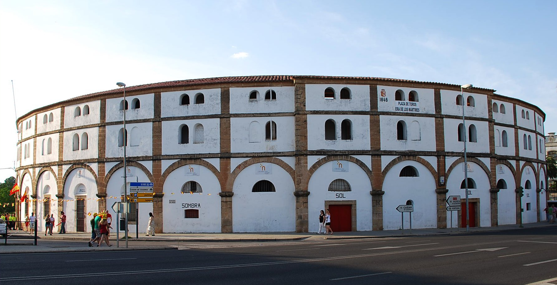 Plaza de toros de Cáceres (Extremadura, España)